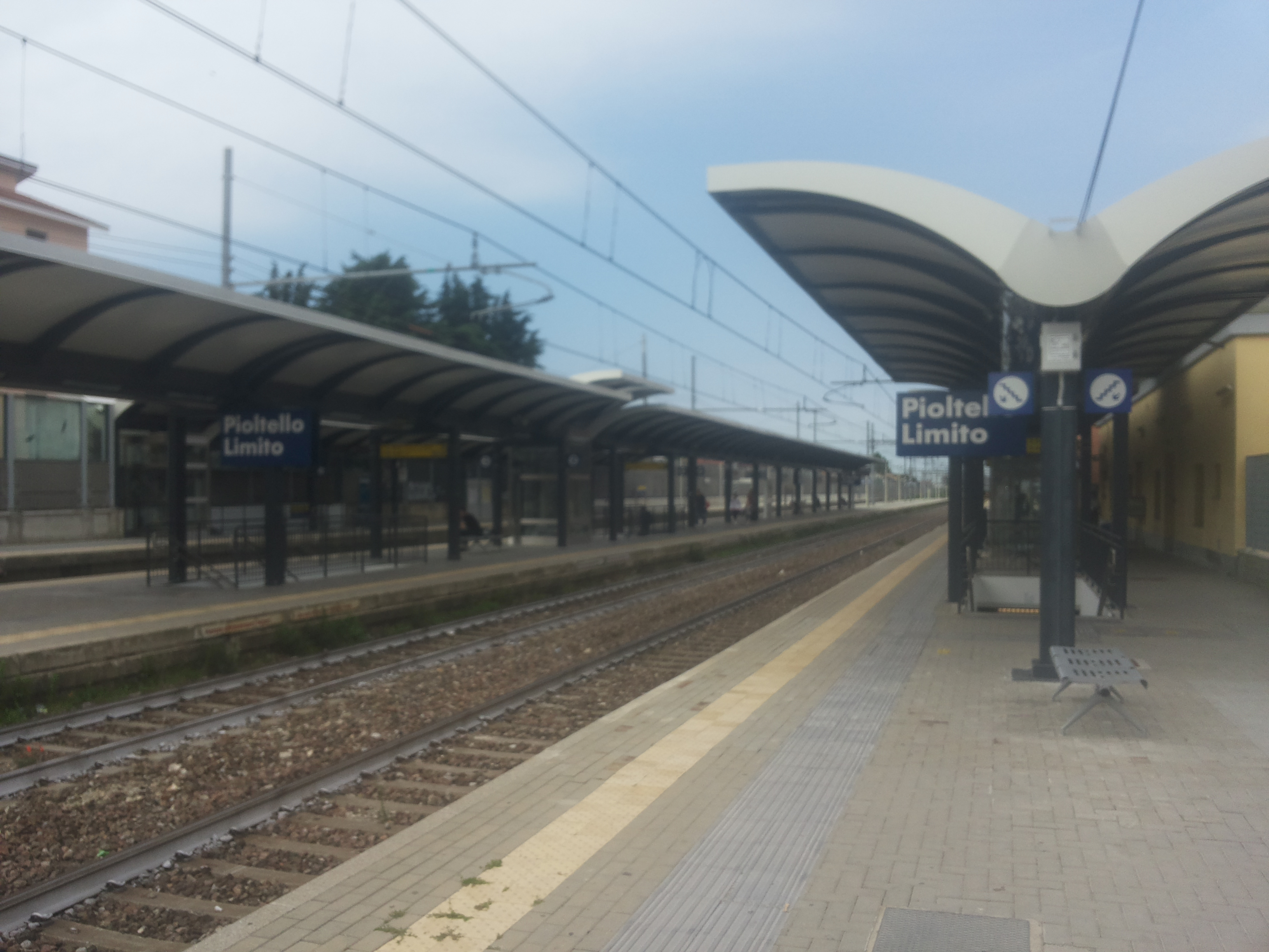 Stazione di Pioltello-Limito